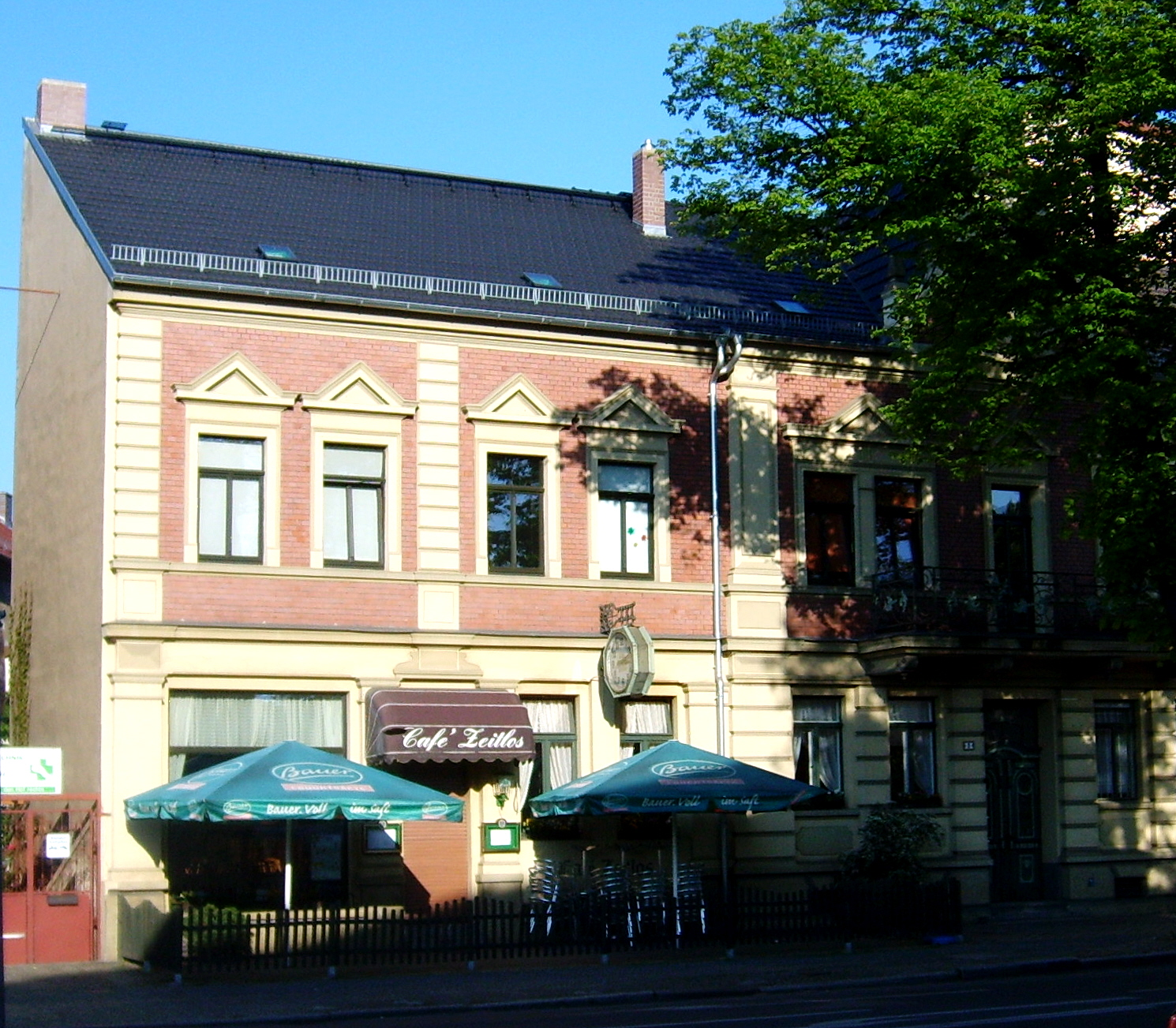 Das Baudenkmal Berliner Straße 2 in Elsterwerda